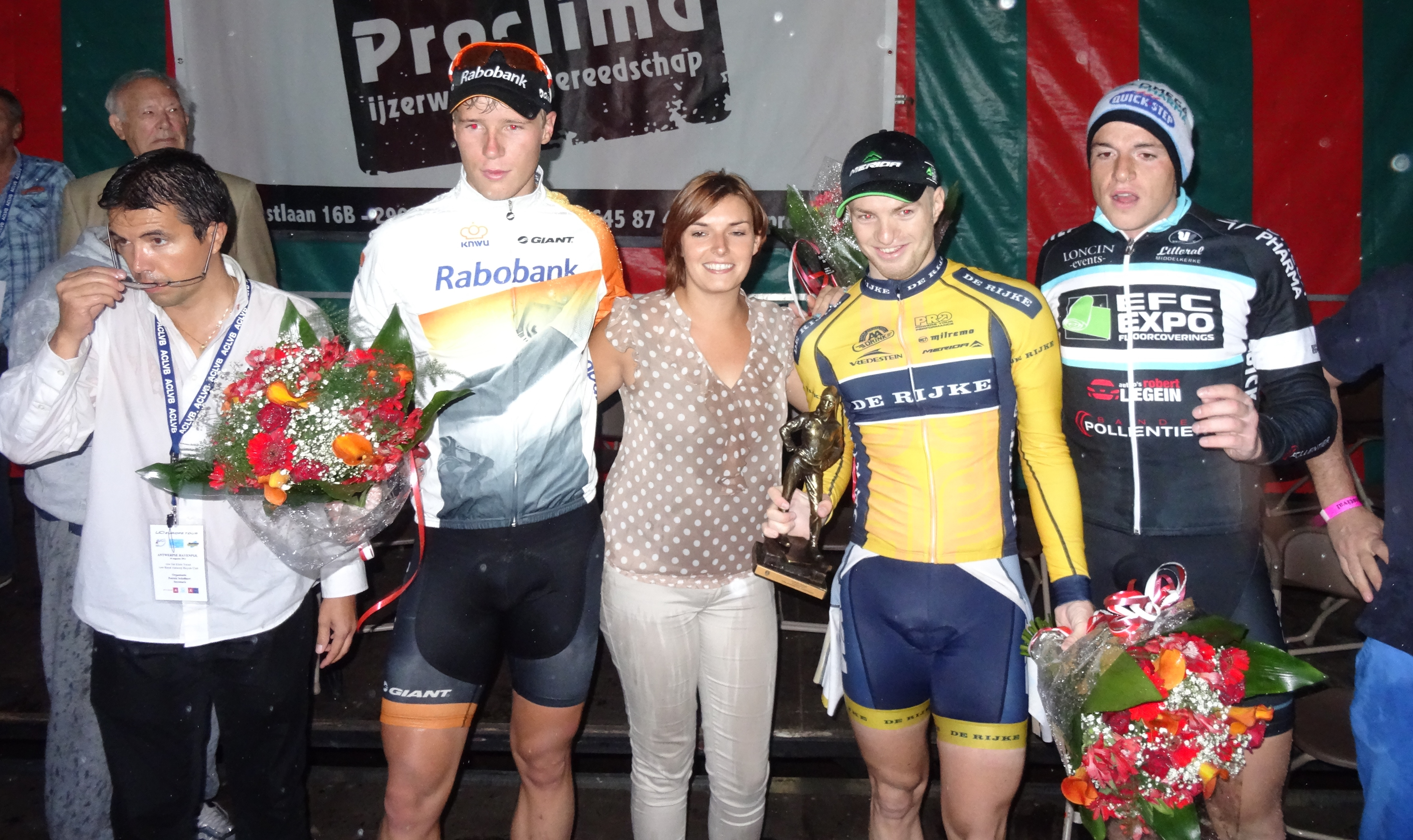 Reportage photographique réalisé le dimanche 10 août à l'occasion du départ et de l'arrivée de la Flèche du port d'Anvers 2014 à Merksem (Anvers), Belgique.